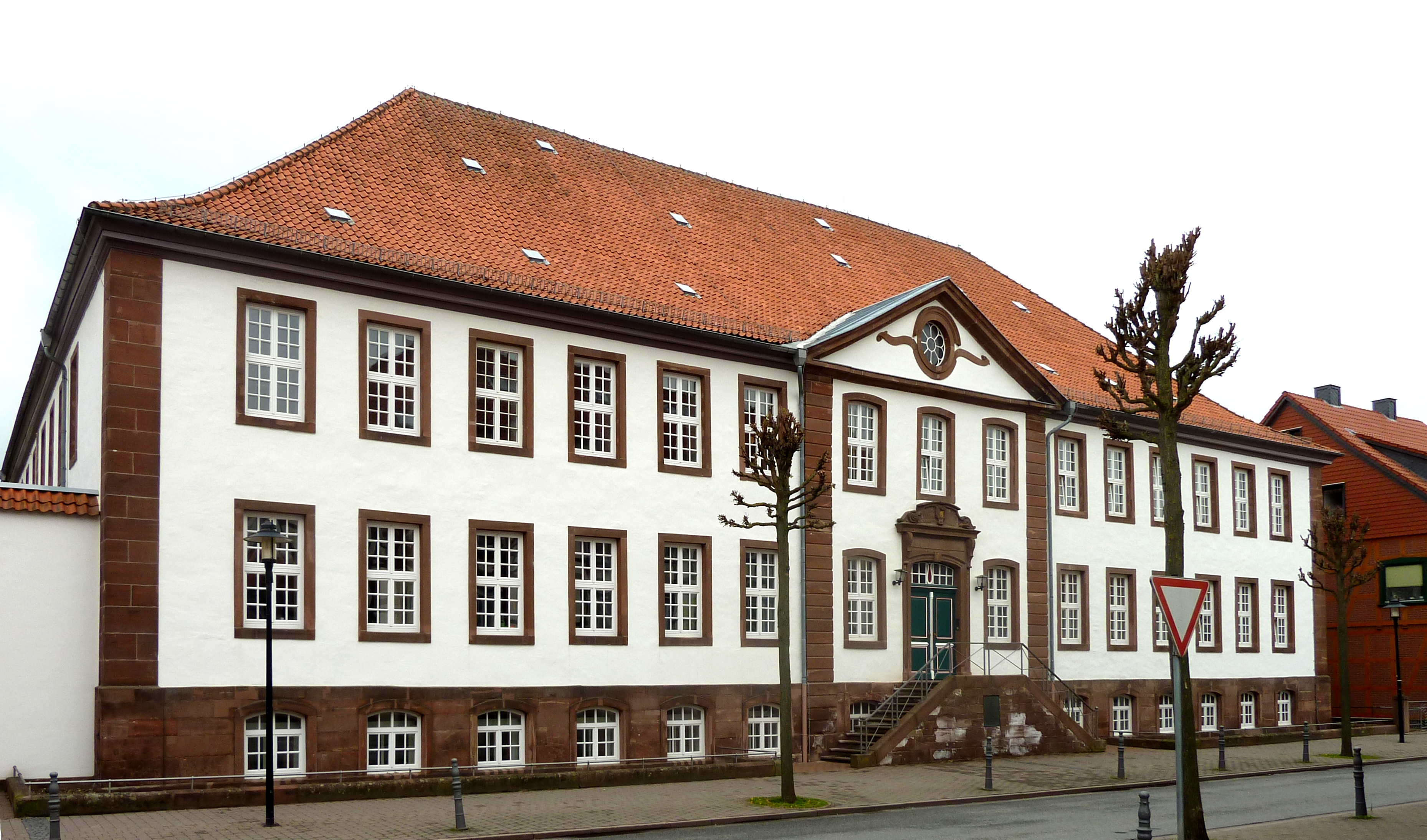 Niedersächsisches Landeskrankenhaus Moringen, Straßenansicht Lange Straße. Erbaut 1738–45 als Waisenhaus für Adlige, ab 1818 Korrektionsanstalt, ab 1838 Polizeigefängnis, von 1871 bis 1956 Werkhaus. In der Nazizeit KZ zunächst für Frauen, später für Jugendliche. Seit 1956 Landeskrankenhaus.